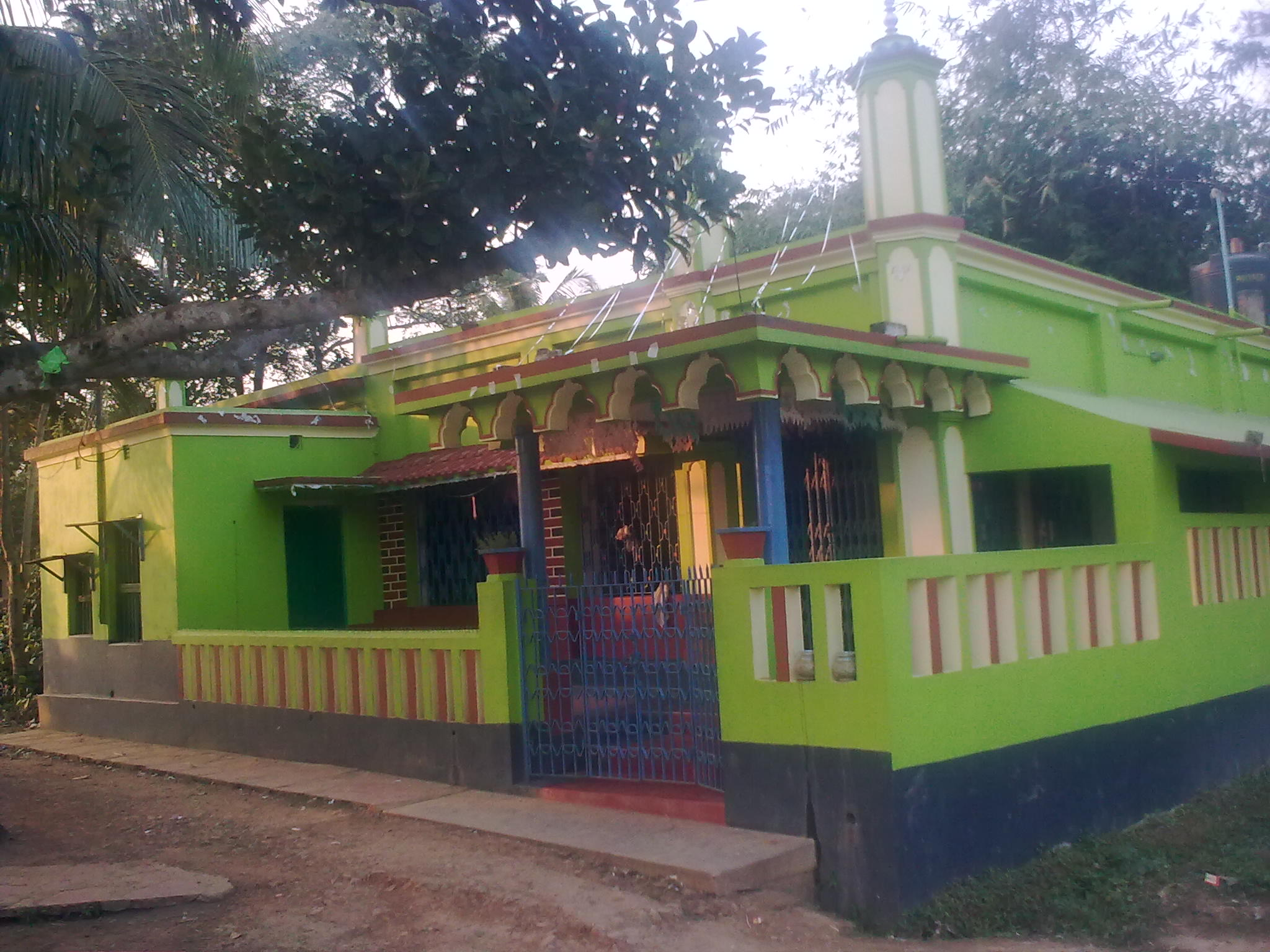 মসজিদ